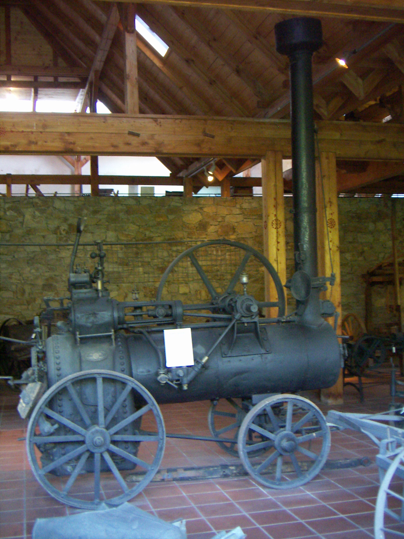 Stationäre Dampfmaschine, Hofherr-Schrantz, Baujahr 1924, Typ: 3 HP, 3 PS, 8 ATM, 1 Zylinder, Lokomobil